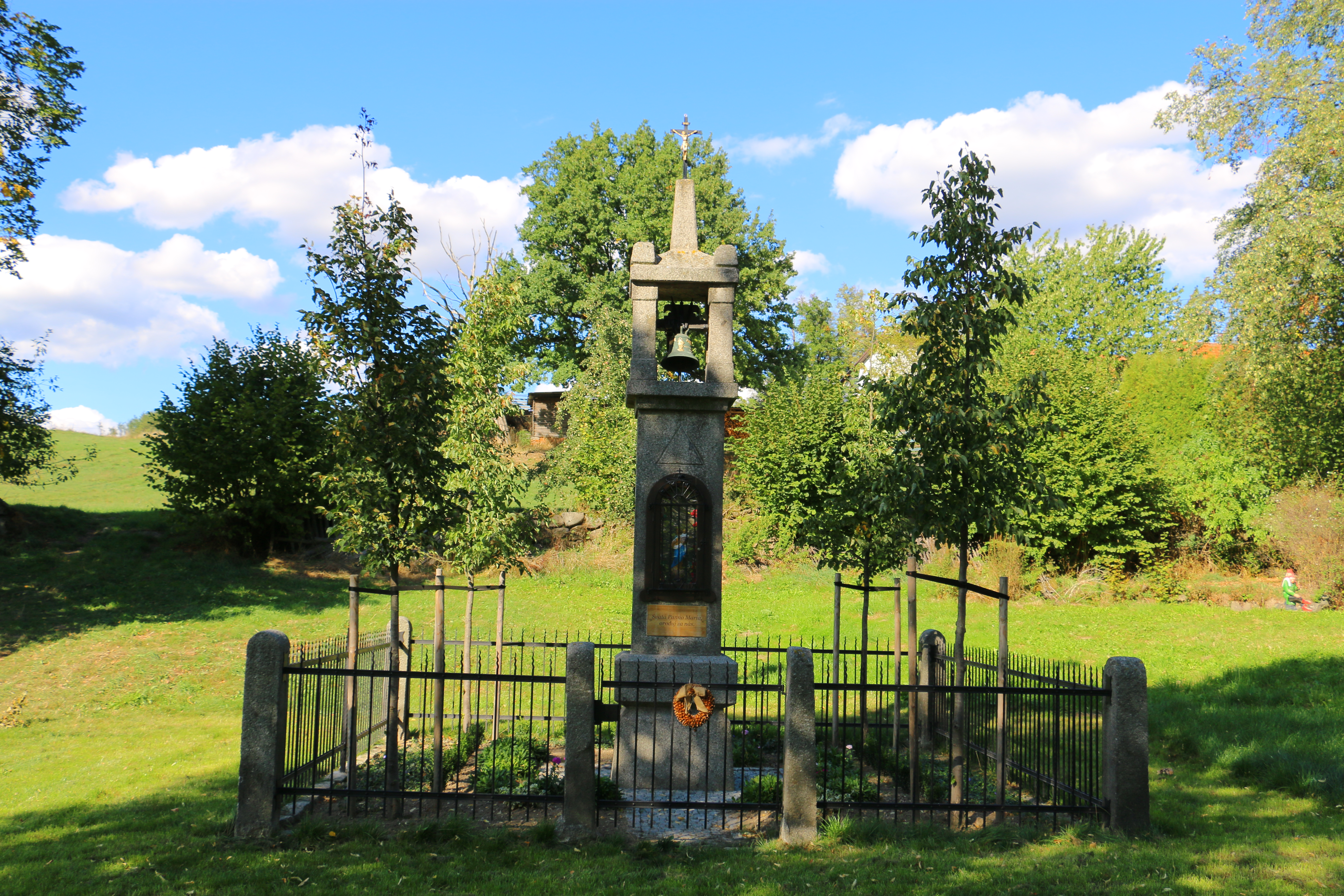 Přibýška, okres Příbram Project: Fotíme Česko.